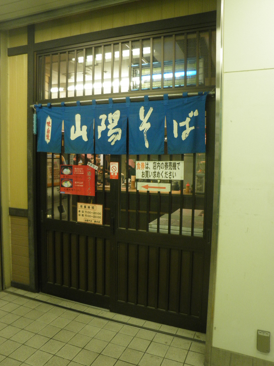 山陽そば垂水店